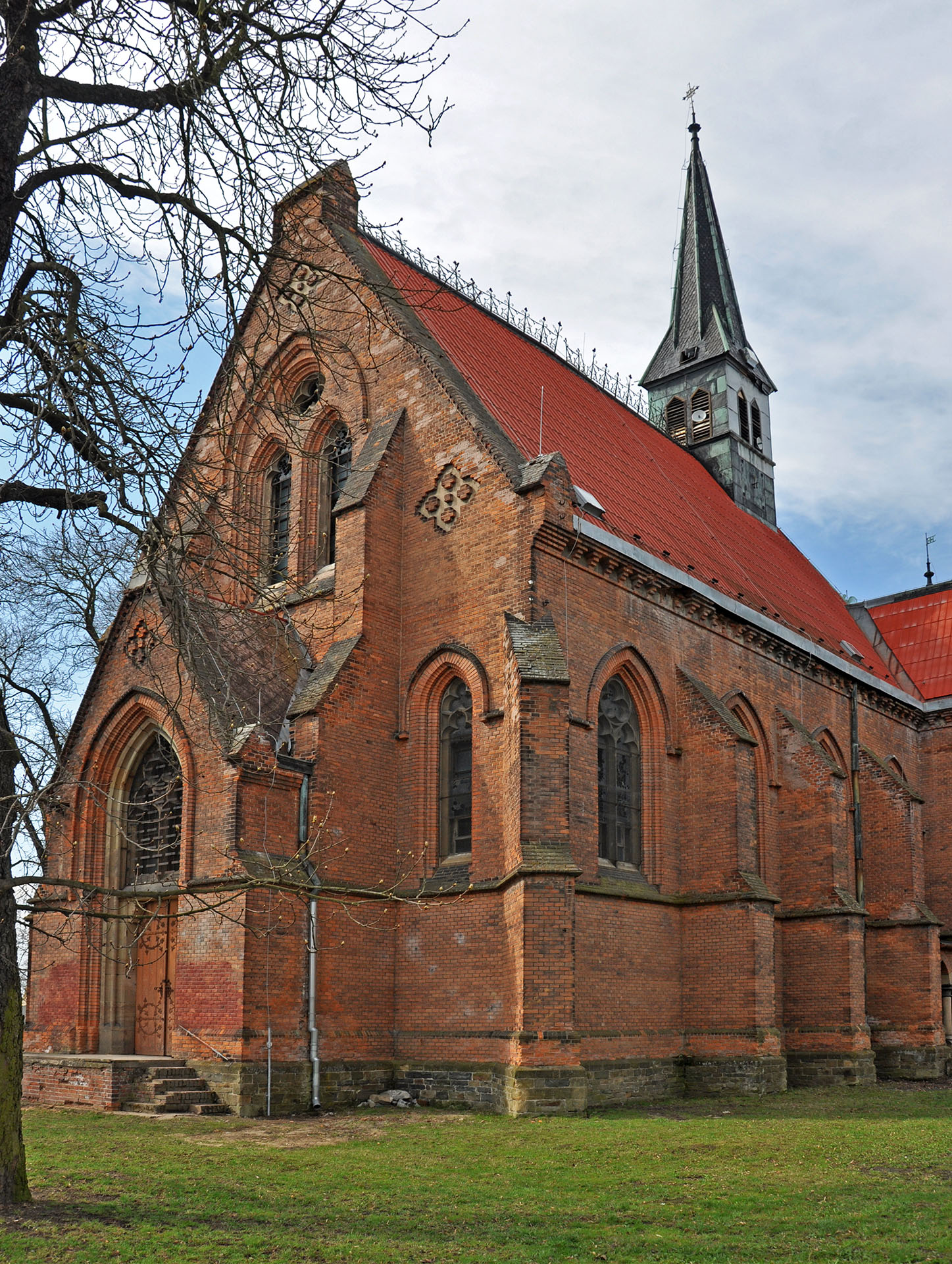 Kostel svaté Barbory, Nádražní, Štěpánov (okres Olomouc).